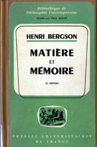 Einband der Ausgabe von Les Presses universitaires de France, 1965